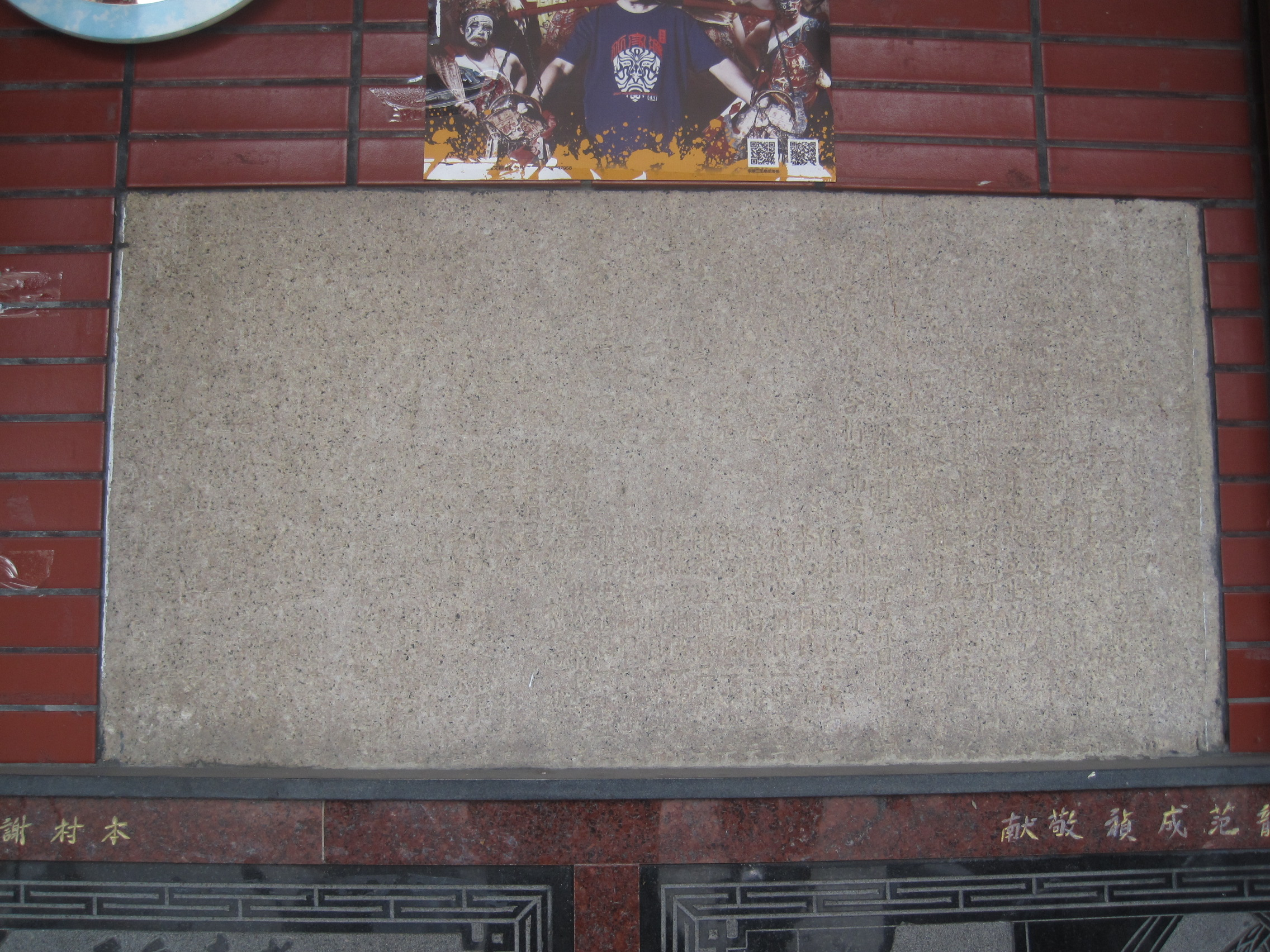 位於廟左的石碑